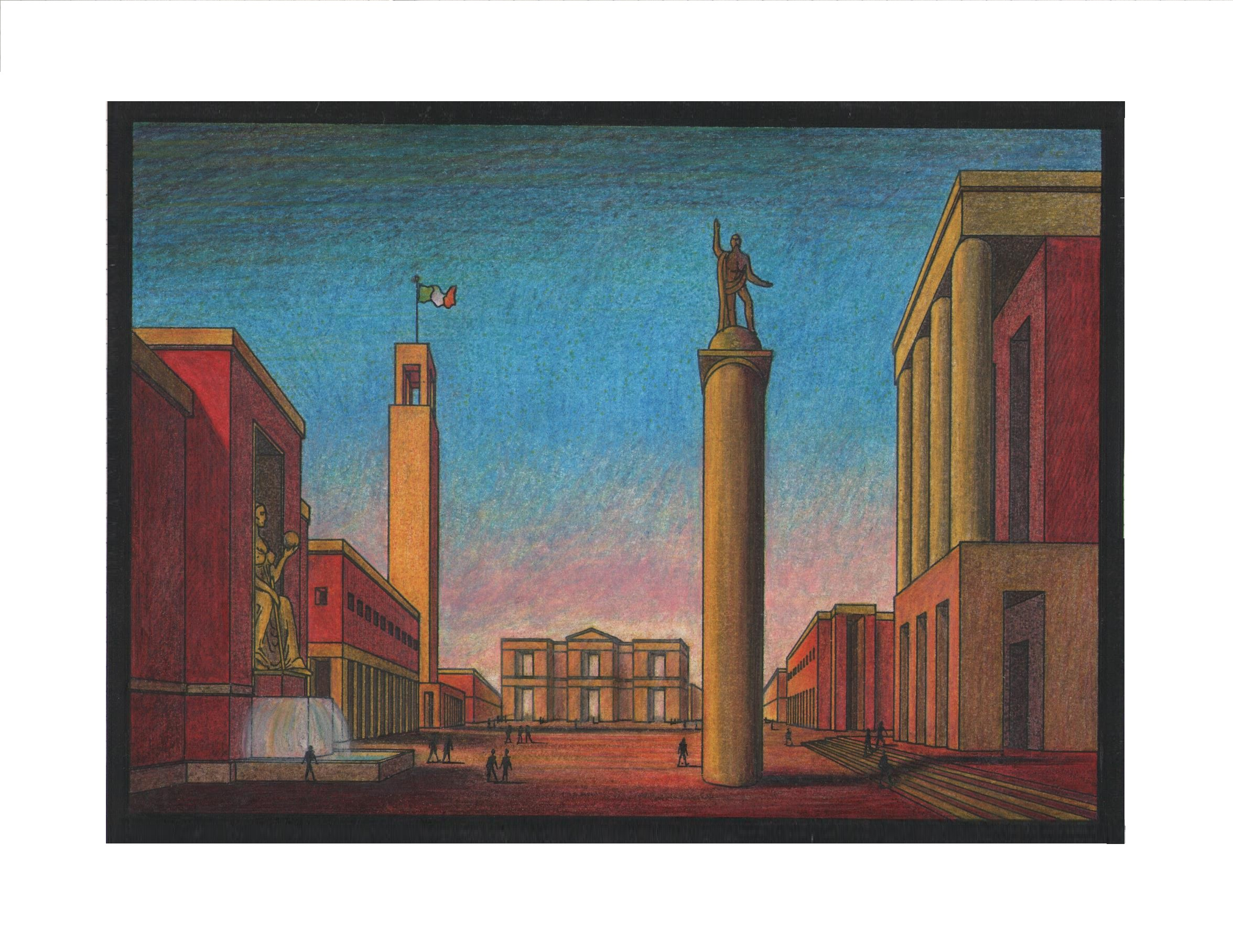 Arnaldo Dell'Ira (1903-1943), Piazza d'Italia 3